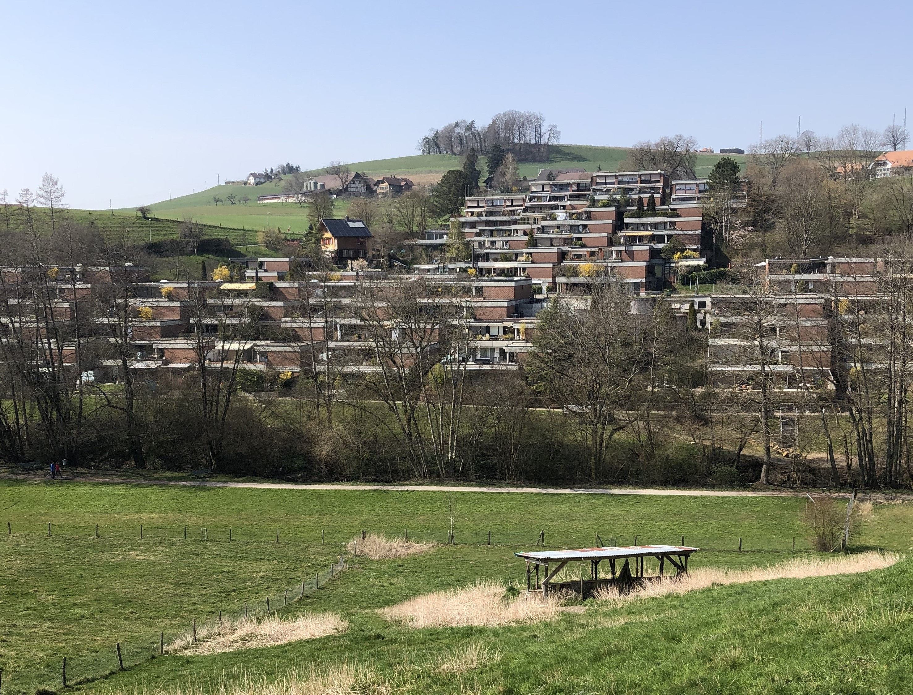 Blick von Gäbelbach auf das Riedernrain-Quartier 1